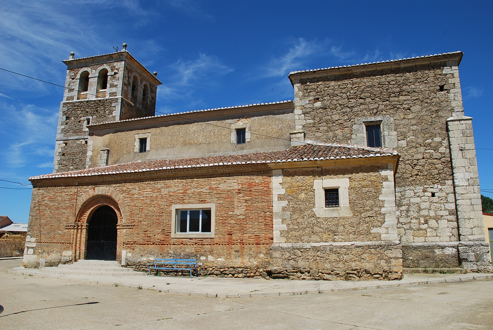 Iglesia de Santiago en Polvorosa de Valdavia (Palencia, Castilla-León). Iglesia parroquial del siglo XVI, reformada en el año 1800 con los restos de la Iglesia del despoblado cercano de San María de Villaverde. Posee una importante pila bautismal, relieve del banco con cuatro evangelistas y una tabla románica de la Virgen proveniente también de Villaverde.